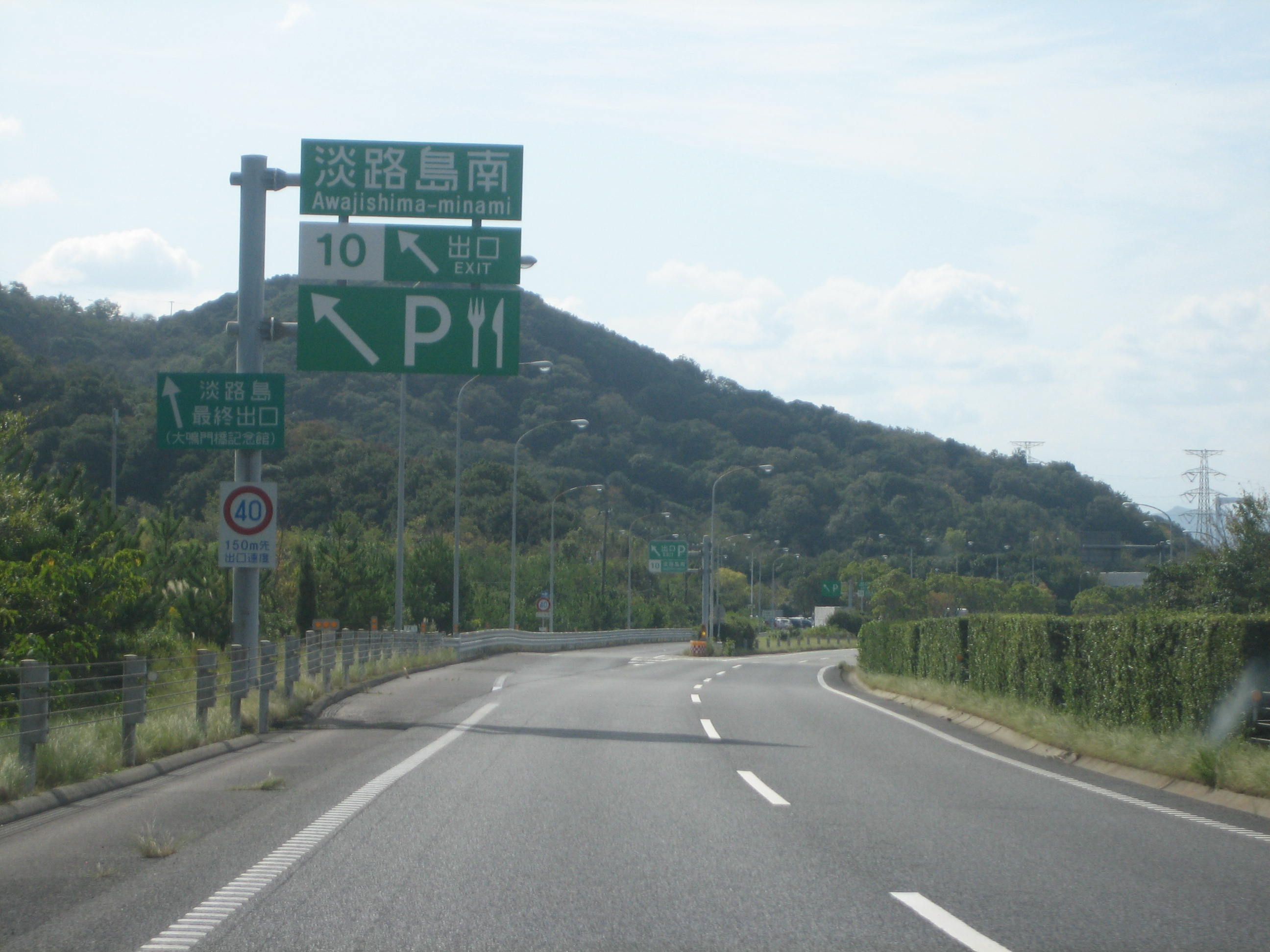 淡路島南IC